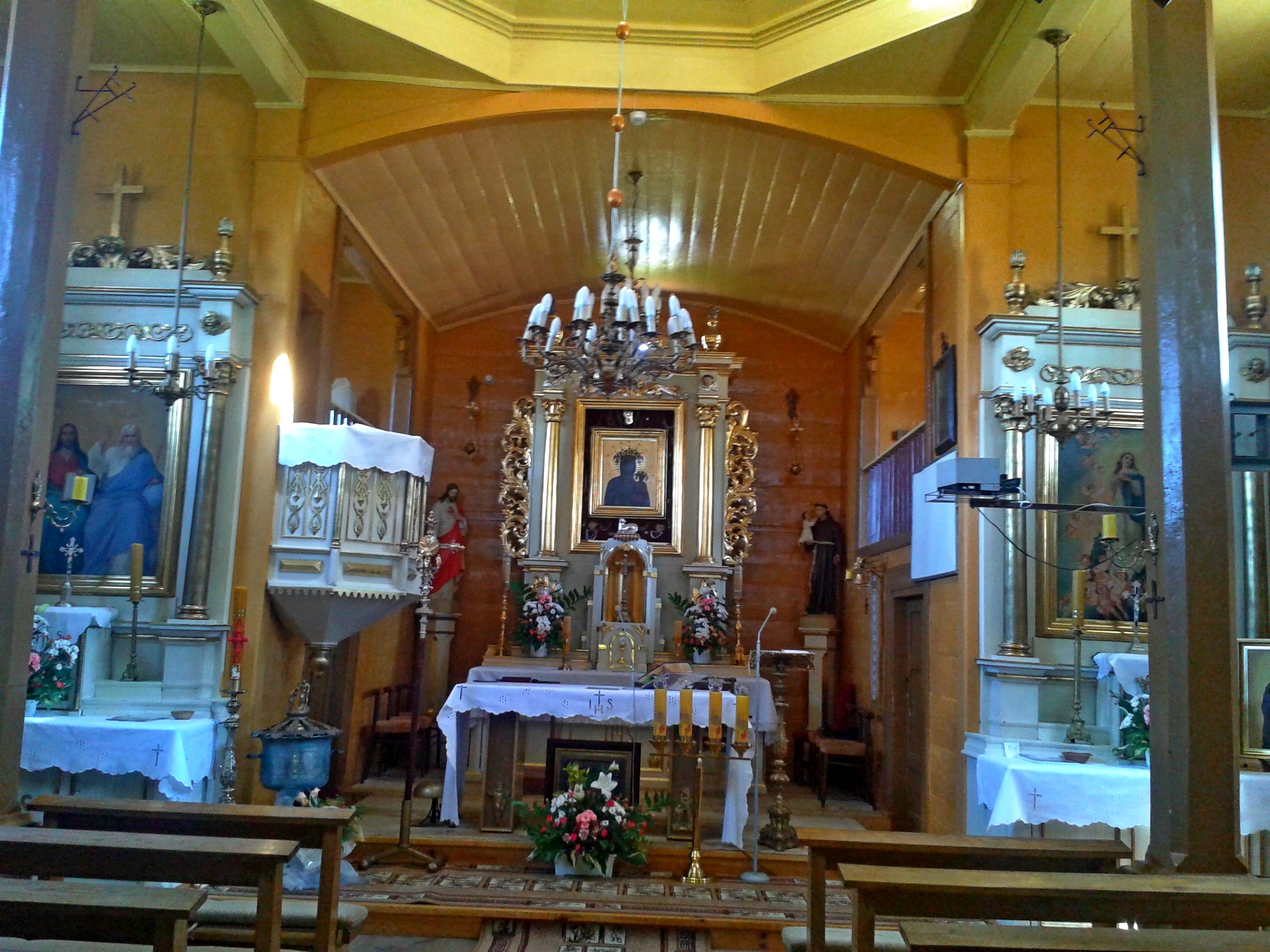 Wnętrze kościoła (dawnej cerkwi) w Rogowie